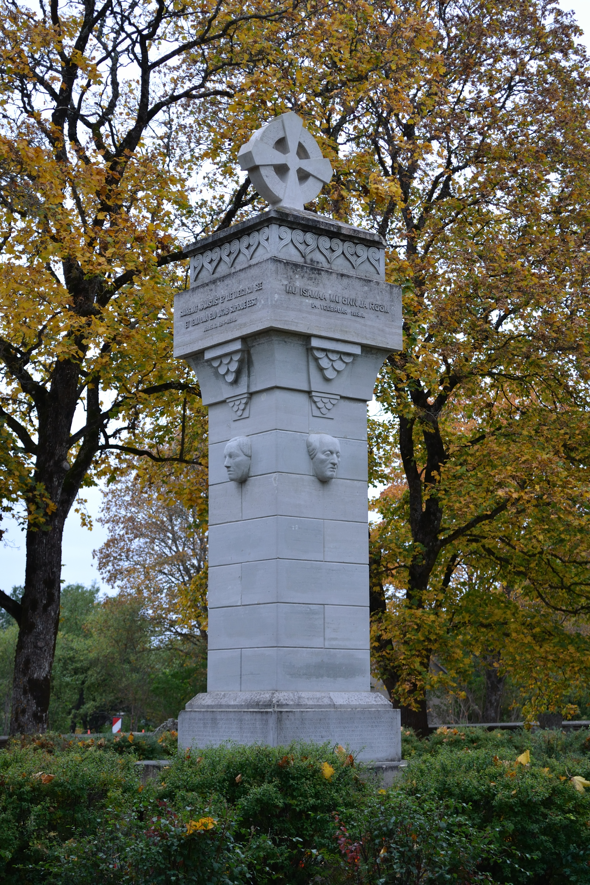 Vabadussõja mälestussammas Raplas